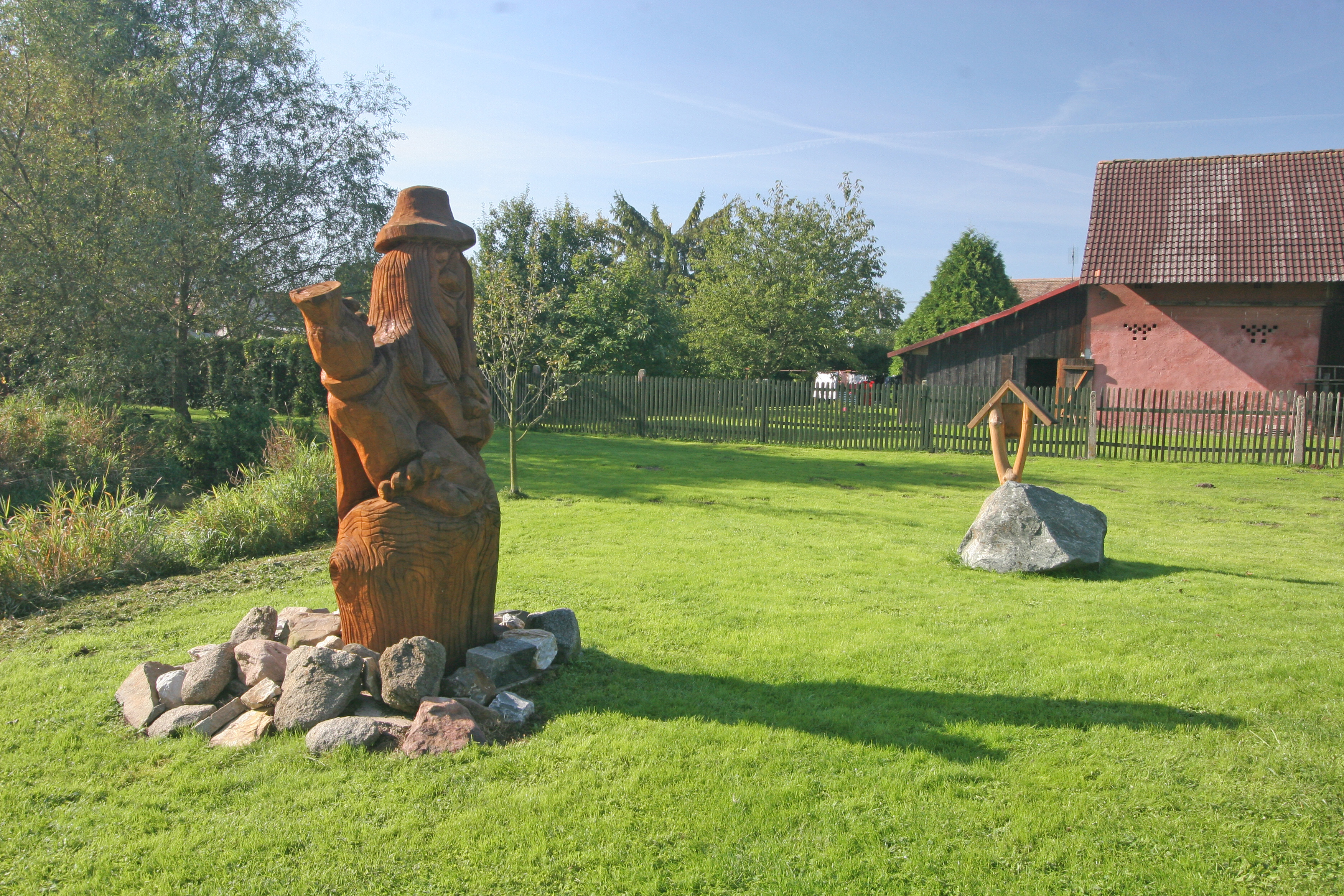 Veselí dřevěná socha